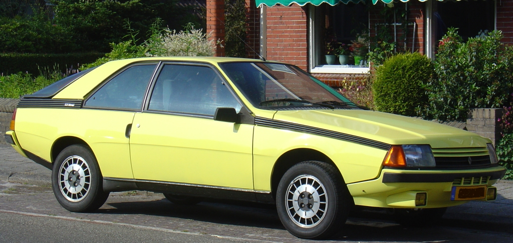 1985 Renault Fuego 2.2i